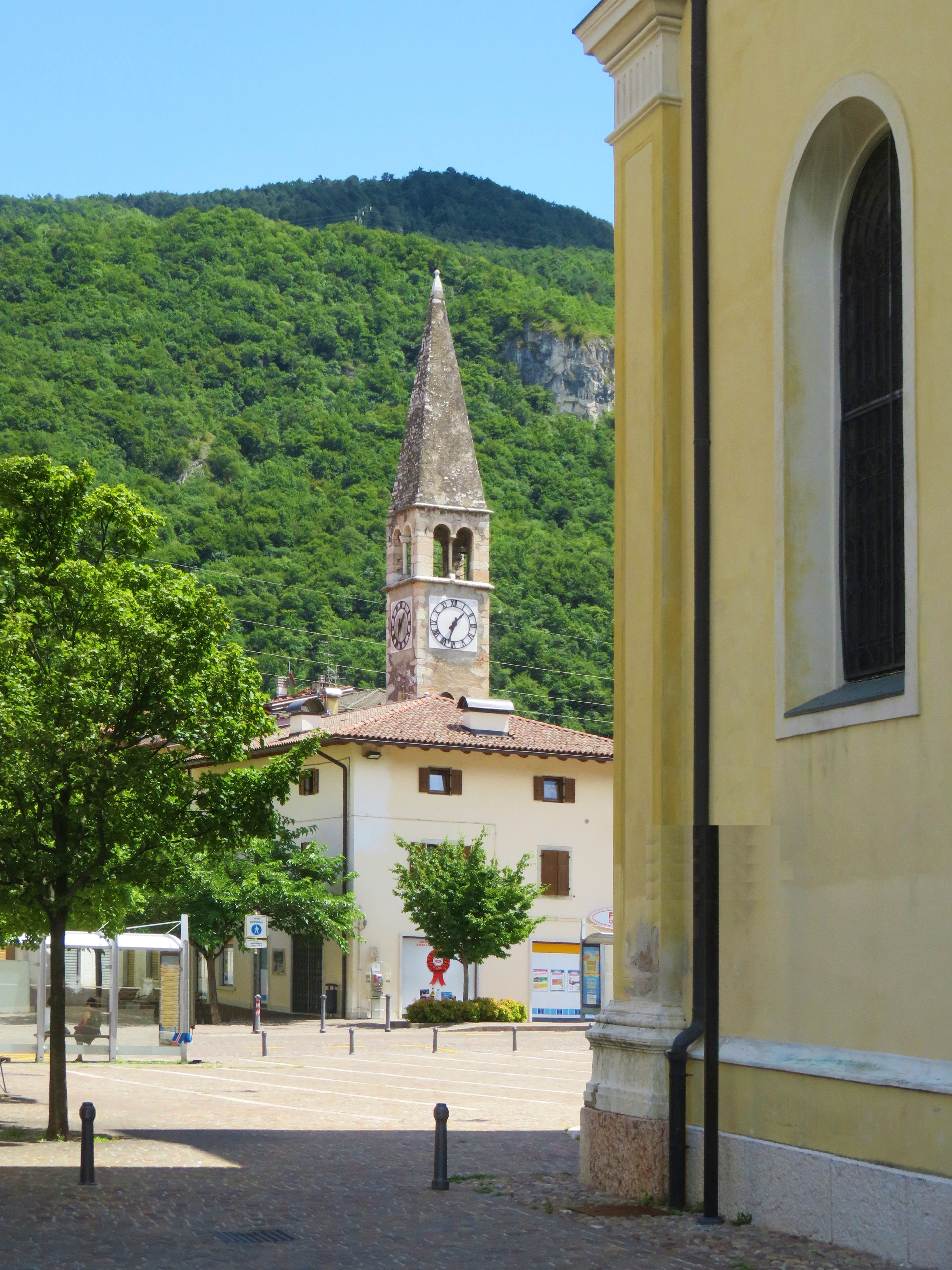 Campanile della vecchia chiesa di Gardolo. L'antica chiesa è stata demolita da secoli ma il campanile è rimasto a lungo il solo campanile del paese. Solo nel 1925 è stato eretto il nuovo campanile della chiesa della Visitazione di Maria Santissima.